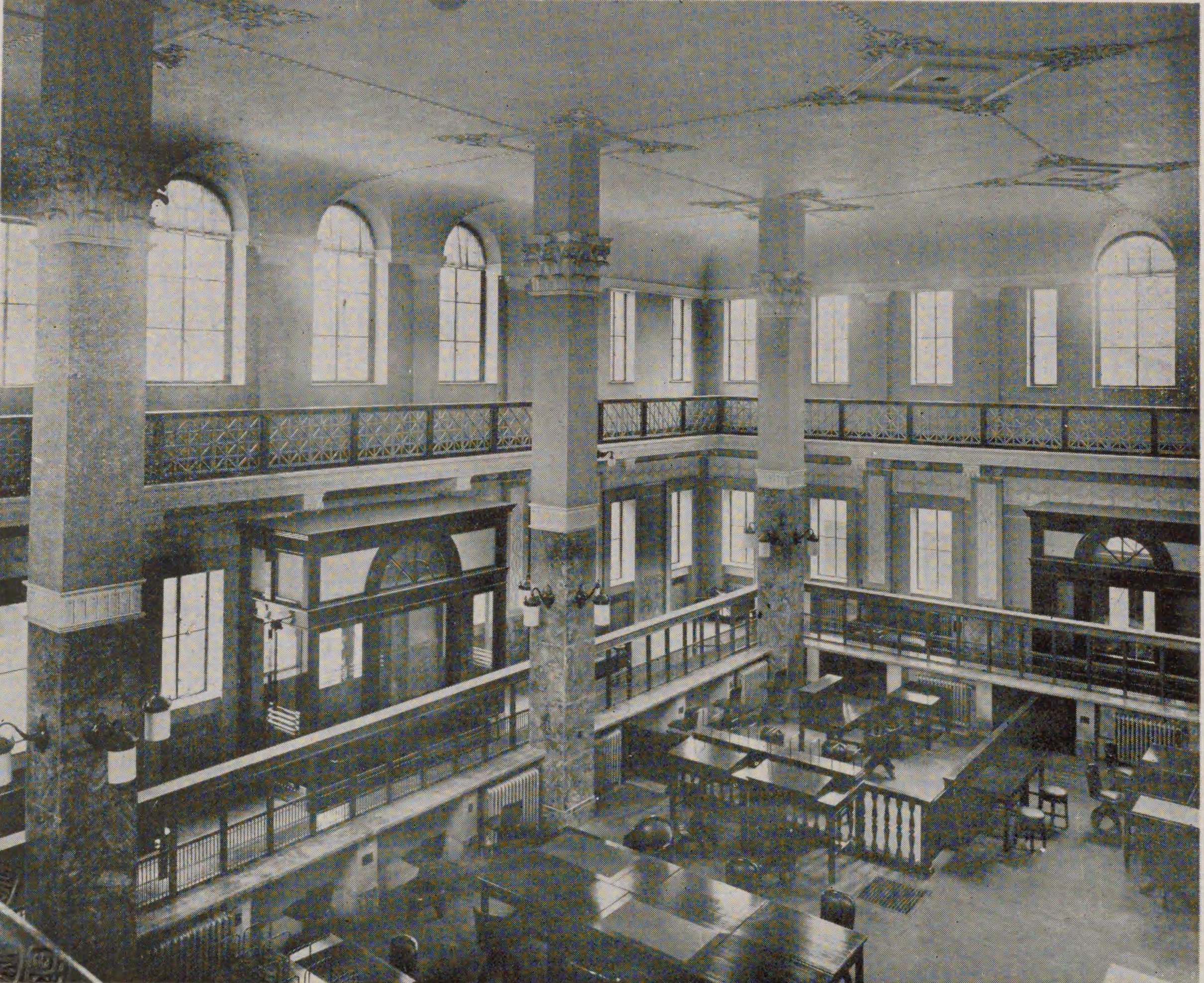 昭和初期の三井銀行広島支店の営業場。